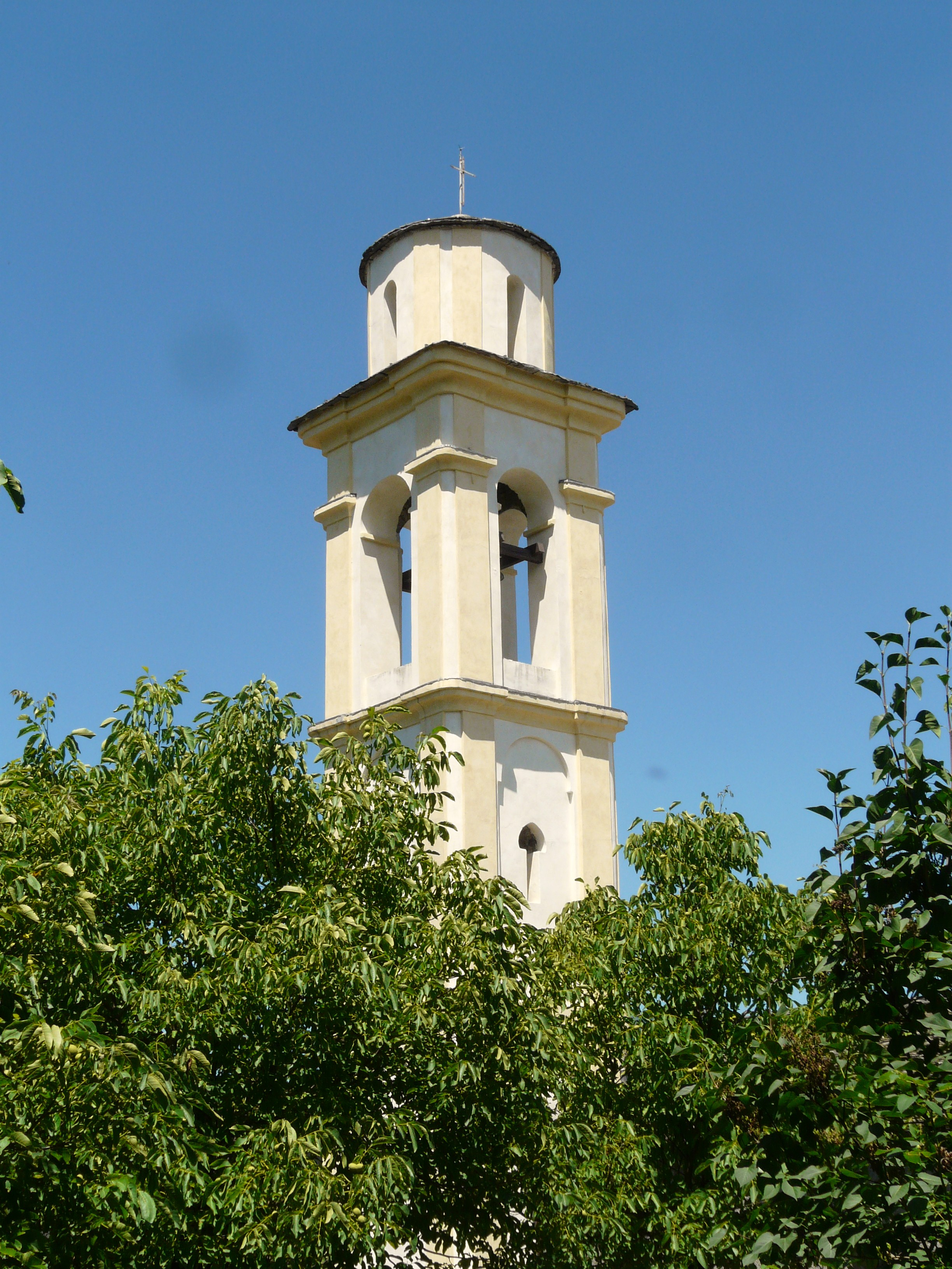 Chiesa di San Rocco, Tornolo, Emilia Romagna, Italia